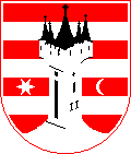 Escudo de armas de Varaždin (grb)